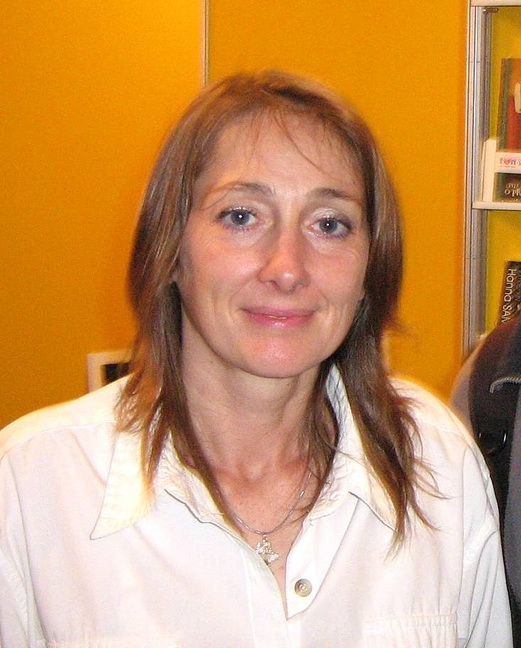 Beata Pawlikowska (ur. 11 czerwca 1965 w Koszalinie) – polska pisarka, podróżniczka, dziennikarka, fotografka, tłumaczka.